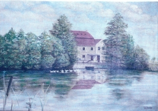 Bild für den Artikel David Lorenz.